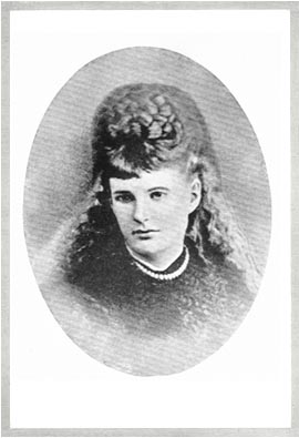 Anna Bonus Kingsford (1846-1888)